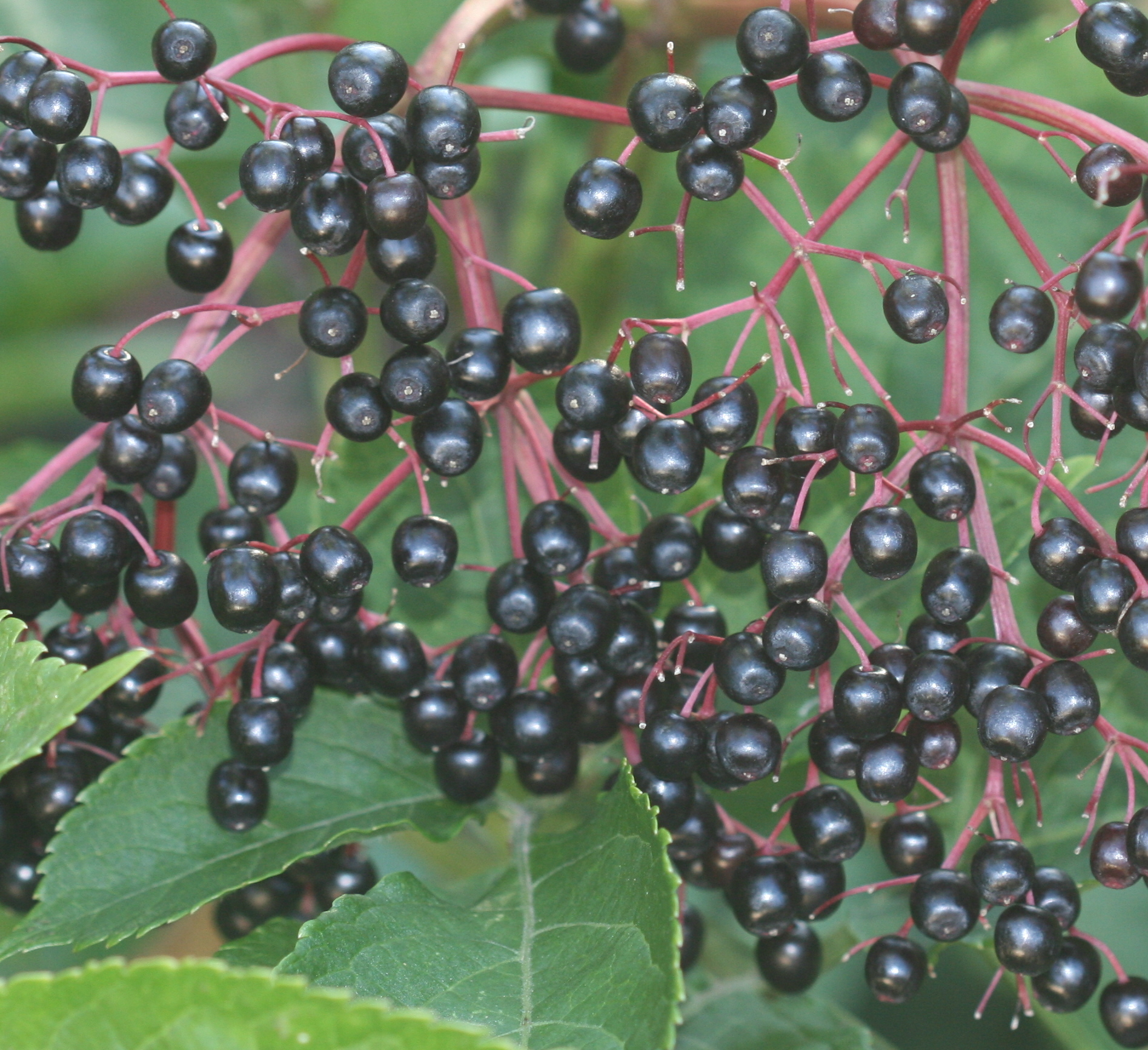 Elder berries (Sambucus nigra)